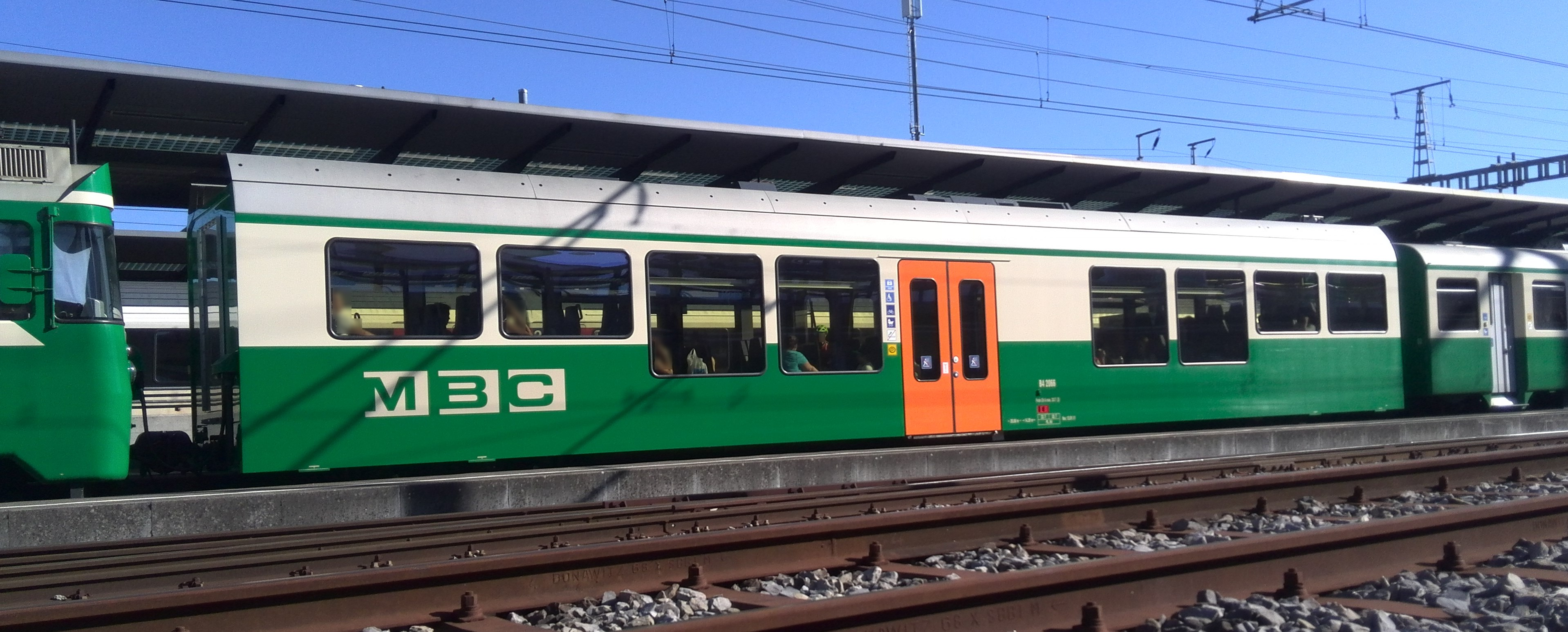 MBC Voiture Voyageur B 2066 construite par Stadler